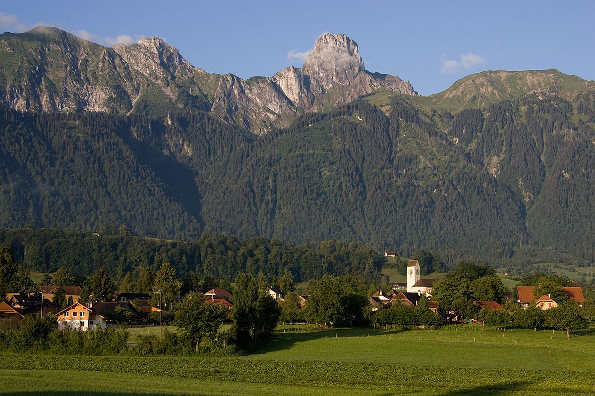 Amsoldingen